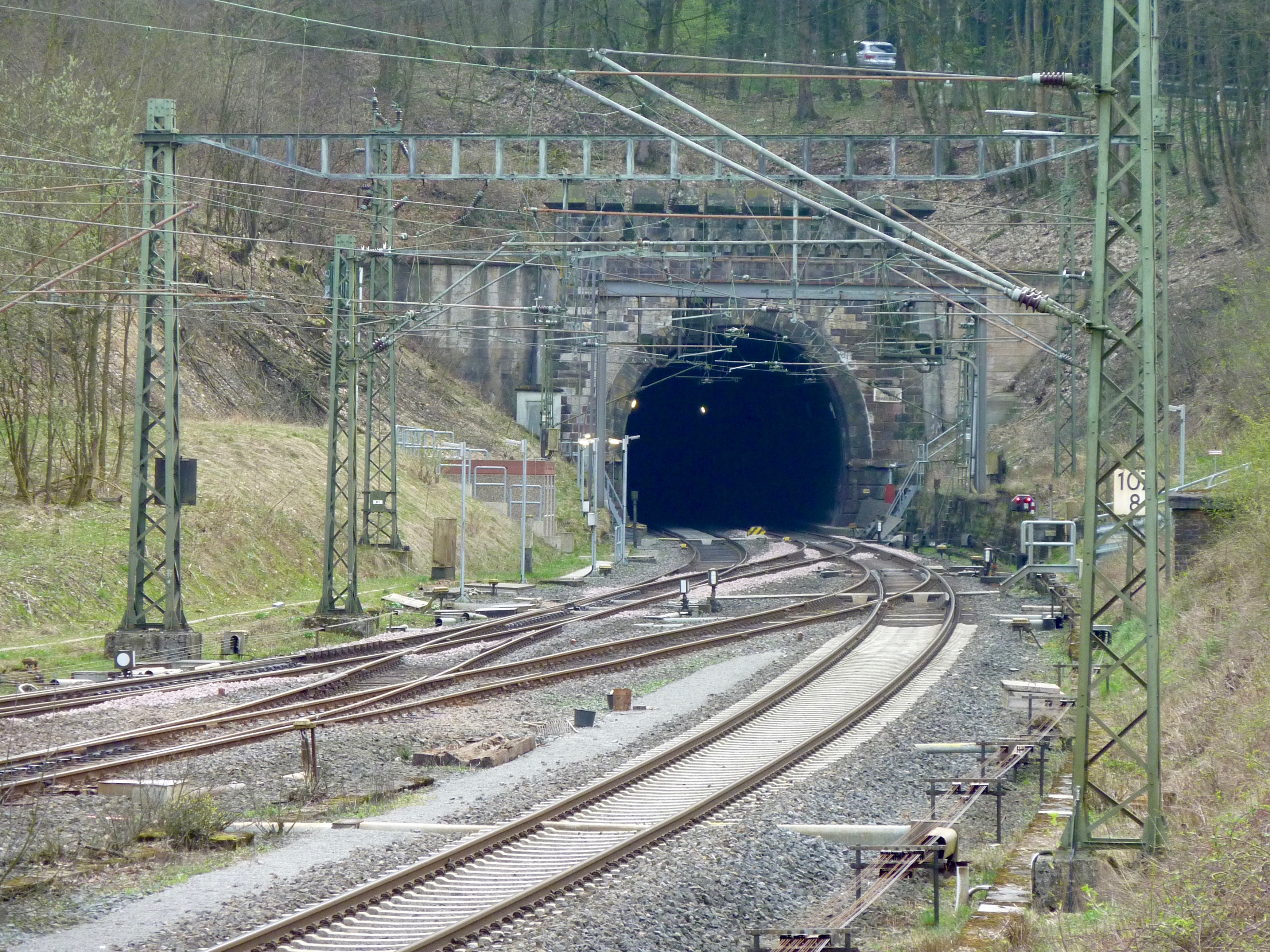 Rehbergtunnel - Blick auf das Ostportal in Bad Driburg-Langeland